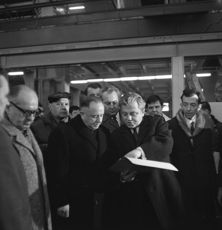 Berlin, Mileke besucht Werk "7. Oktober" Zentralbild/Kutscher 11.2.70 Berlin: Minister Erich Mielke bei Werktätigen des VEB Kombinat "7.Oktober" Der Minister für Staatssicherheit der DDR, Erich Mielke (l.), besuchte am 11.2.70, begleitet vom 2. Sekretär der SED-Bezirksleitung Berlin, Konrad Naumann (2.v.l.), die Werktätigen des VEB Kombinat WMW "7.Oktober". Bei einem Betriebsrundgang erläuterte Generaldirektor Wolfgang Biermann (M.) den Gästen Arbeitsunterlagen. Korrektur zur Originalbeschreibung: Konrad Naumann ist in der Mitte zwischen Mielke und Biermann abgebildet, nicht die Person 2.v.l. --94.223.191.77 14:46, 17 February 2009 (UTC) Abgebildete Personen: Mielke, Erich: Minister für Staatssicherheit, Armeegeneral, Politbüro des Zentralkomitees (ZK) der SED, DDR (GND 118977490) Naumann, Konrad: 1. Sekretär Bezirksleitung Berlin der SED, Staatsratsmitglied, DDR (GND 121094510) Biermann, Wolfgang: Generaldirektor des VEB Kombinat Karl Zeiss Jena, DDR (GND 119367483)